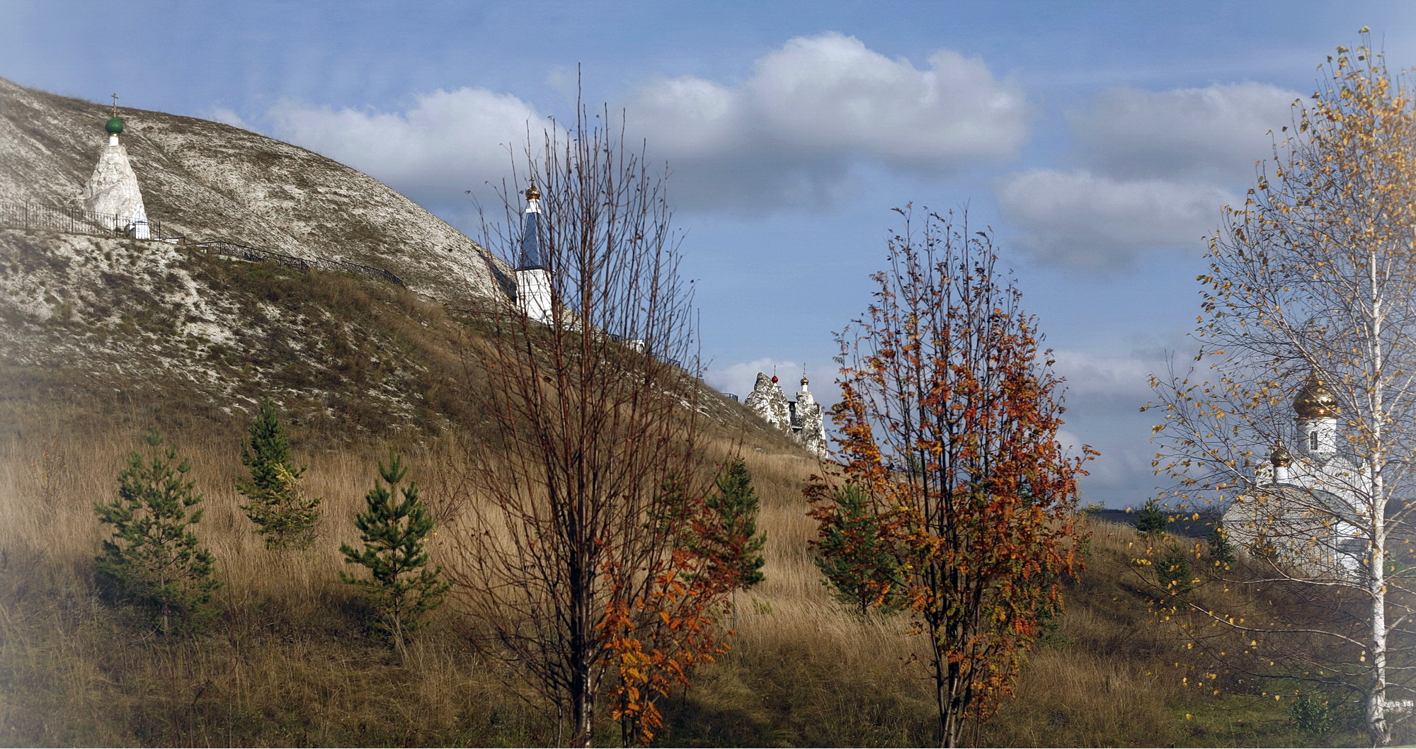 общий вид